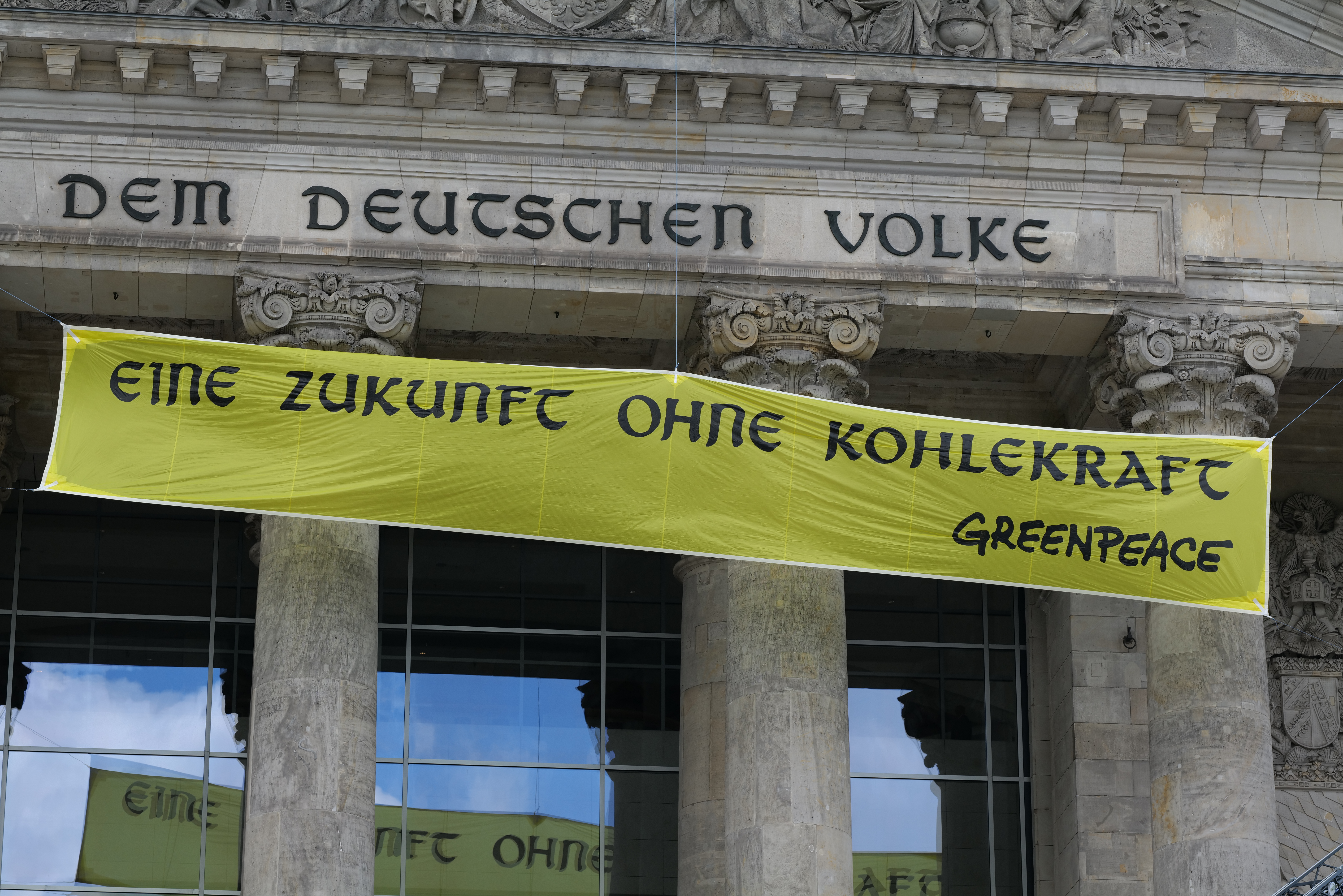 Banner von Greenpeace am Reichstagsgebäude in Berlin als Protest gegen das Kohleausstiegsgesetz am 3. Juli 2020.